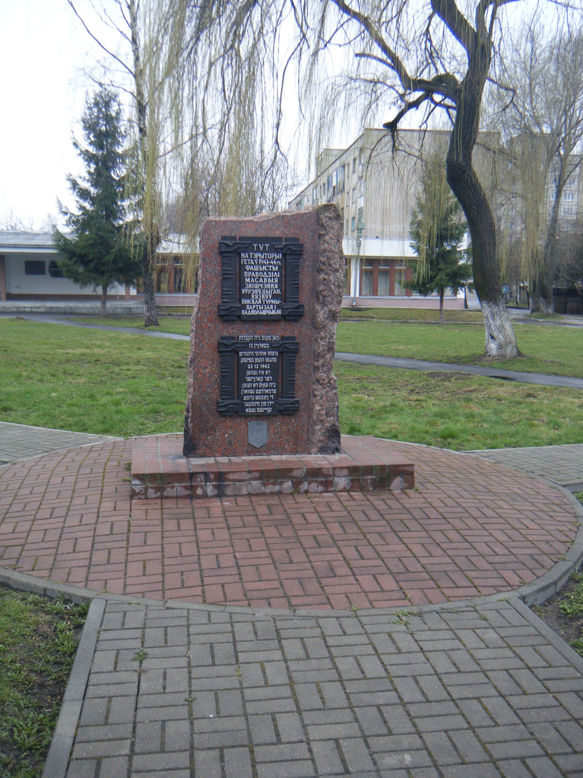 Мемориал на месте массовых убийств евреев Пинского гетто во время Холокоста. Находится на улице Пушкина